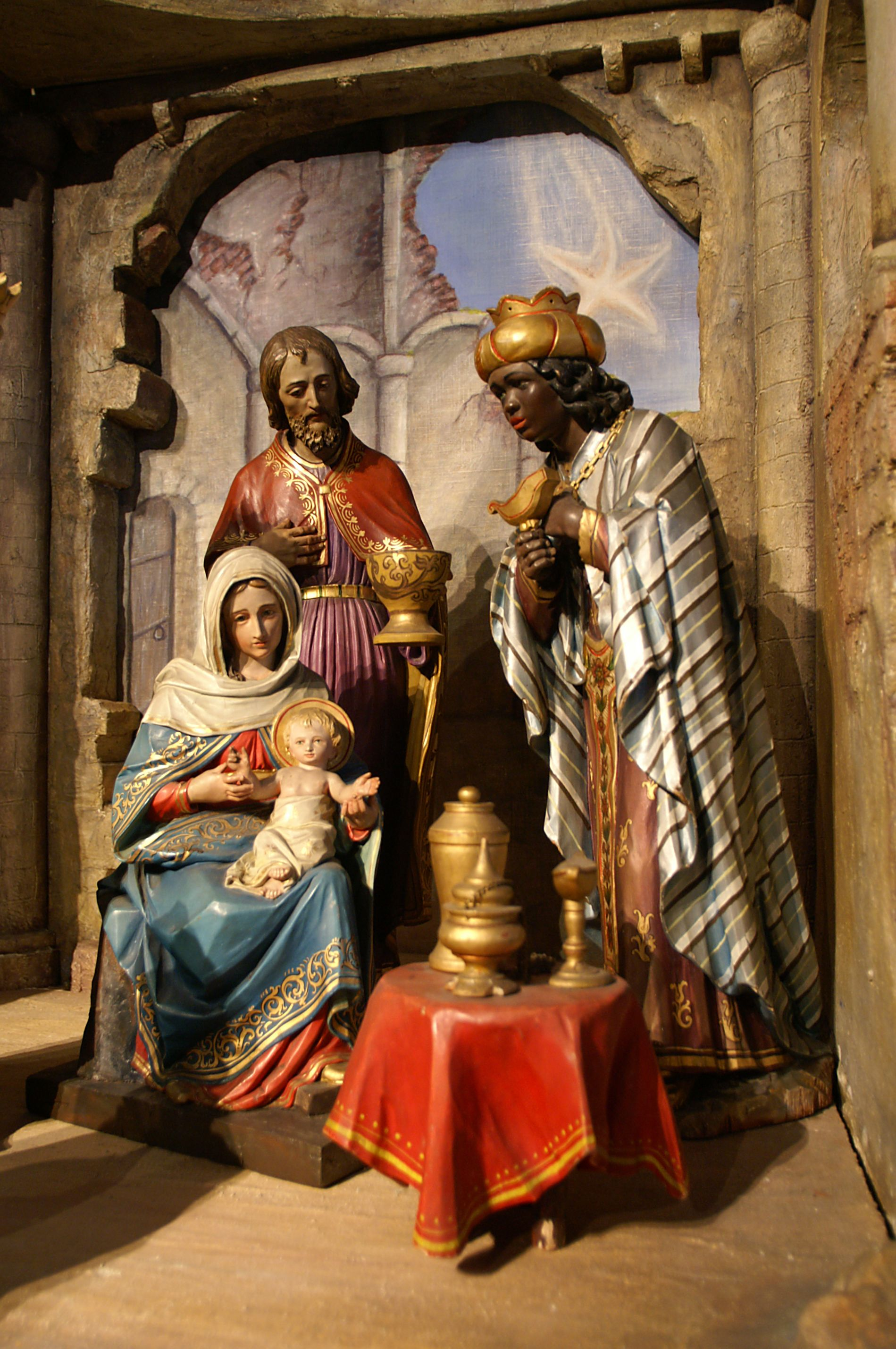 Weihnachtskrippe in der Pfarrkirche hl. Nikolaus, Wolfurt. Wandbemalung bez. E.Bell 1987 * Krippe Peter Mayrhofer * Figuren von Ars Sacra 1875 Ferdinand Stuflesser um 1900 aus Gröden (Südtirol) * gestiftet von Franziska Dür 1913.